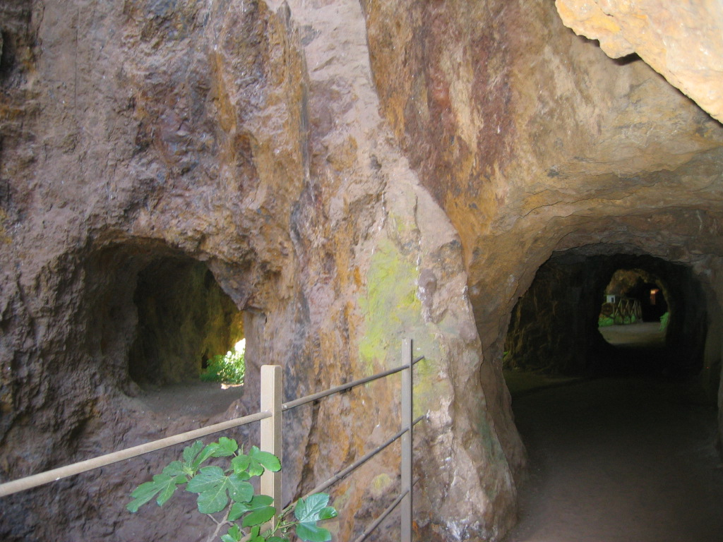 Interior de la Mina de la Jayona, en Fuente del Arco (Badajoz).